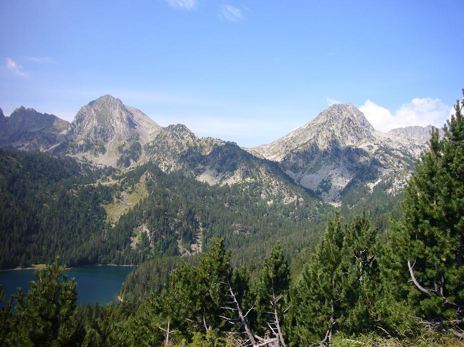 Agulla del Portarró, Portarró d'Espot i Pic del Potarró, vistos des del nord de l'Estant de Sant Maurici; Espot, Pallars Sobirà, Catalunya